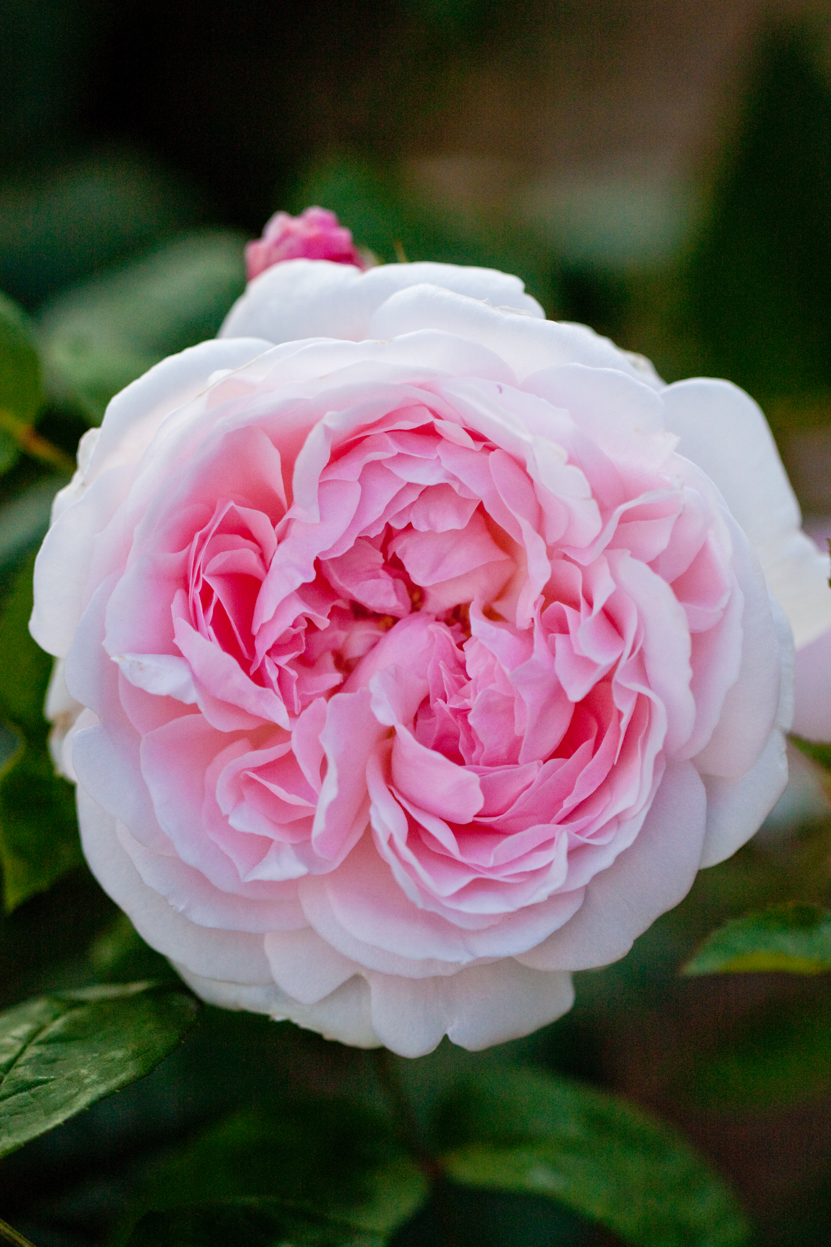 Masako (Eglantyne), マサコ。ご成婚にちなんで皇太子妃雅子様の名を冠したバラ。別名はエグランタイン。上品なピンク。